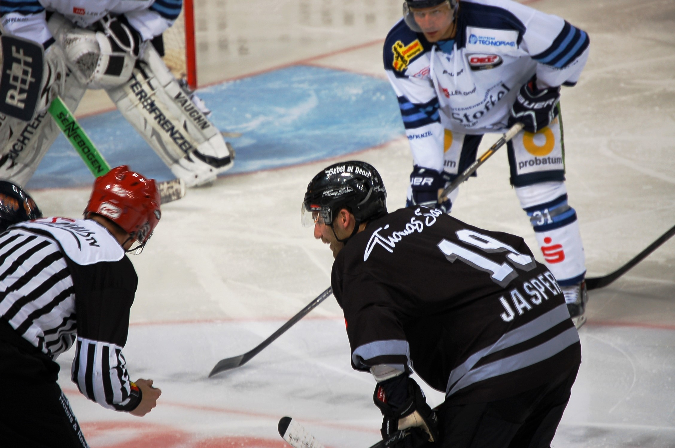 Jason Jaspers im Heimspiel der Nürnberg Ice Tigers gegen die Straubing Tigers am 29.09.2013